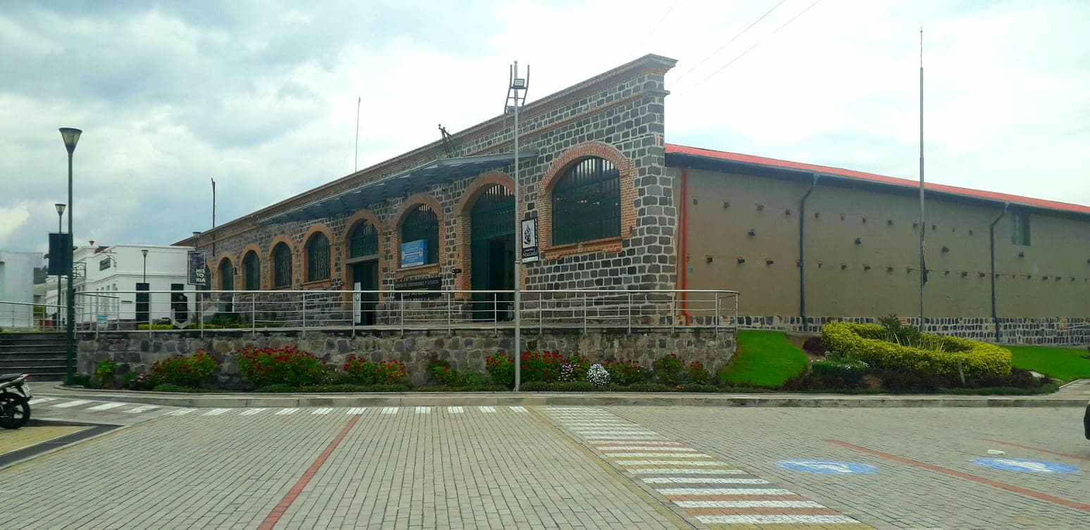 Complejo Cultural Fábrica Imbabura Restaurado